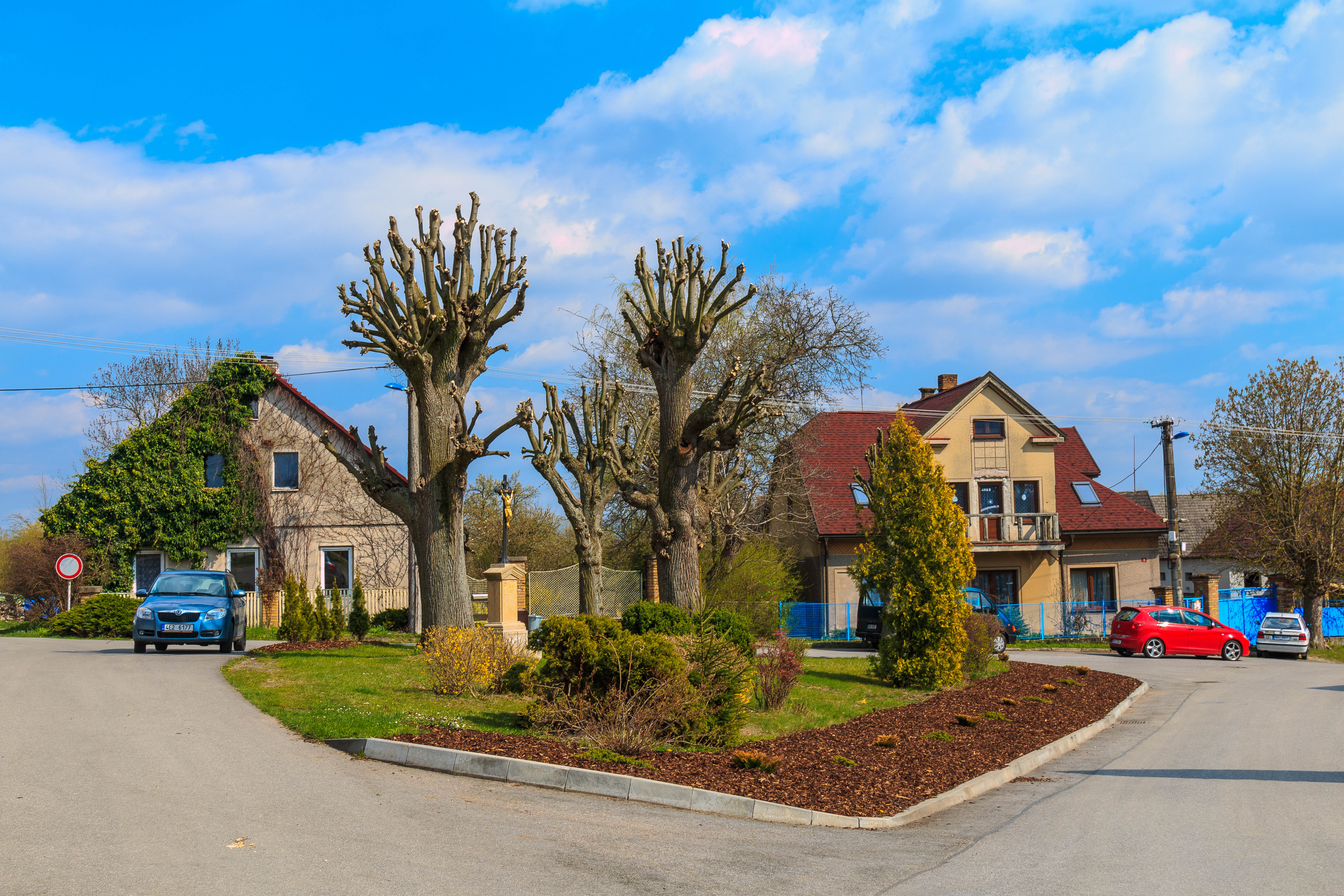 Spyta lípy